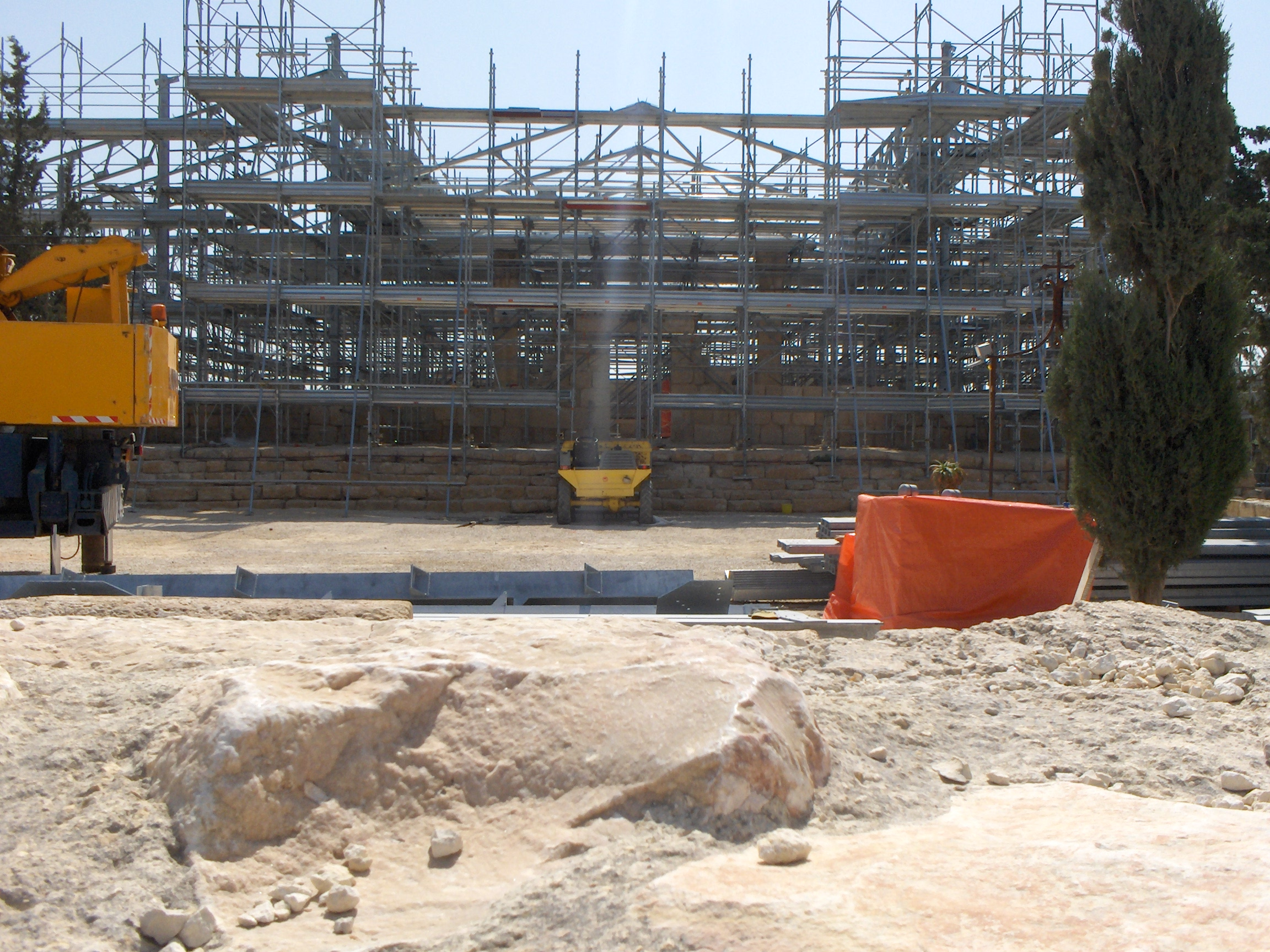 Restauro della basilica del Monte Nebo